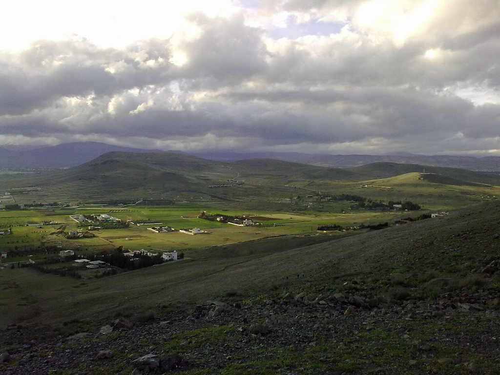 Al Kiswah farms from mountain الكسوة - أم الغوطة الغربية